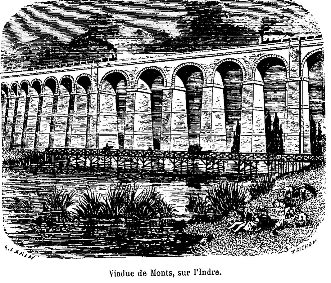 Le viaduc ferroviaire de Monts et le pont routier vers 1880.